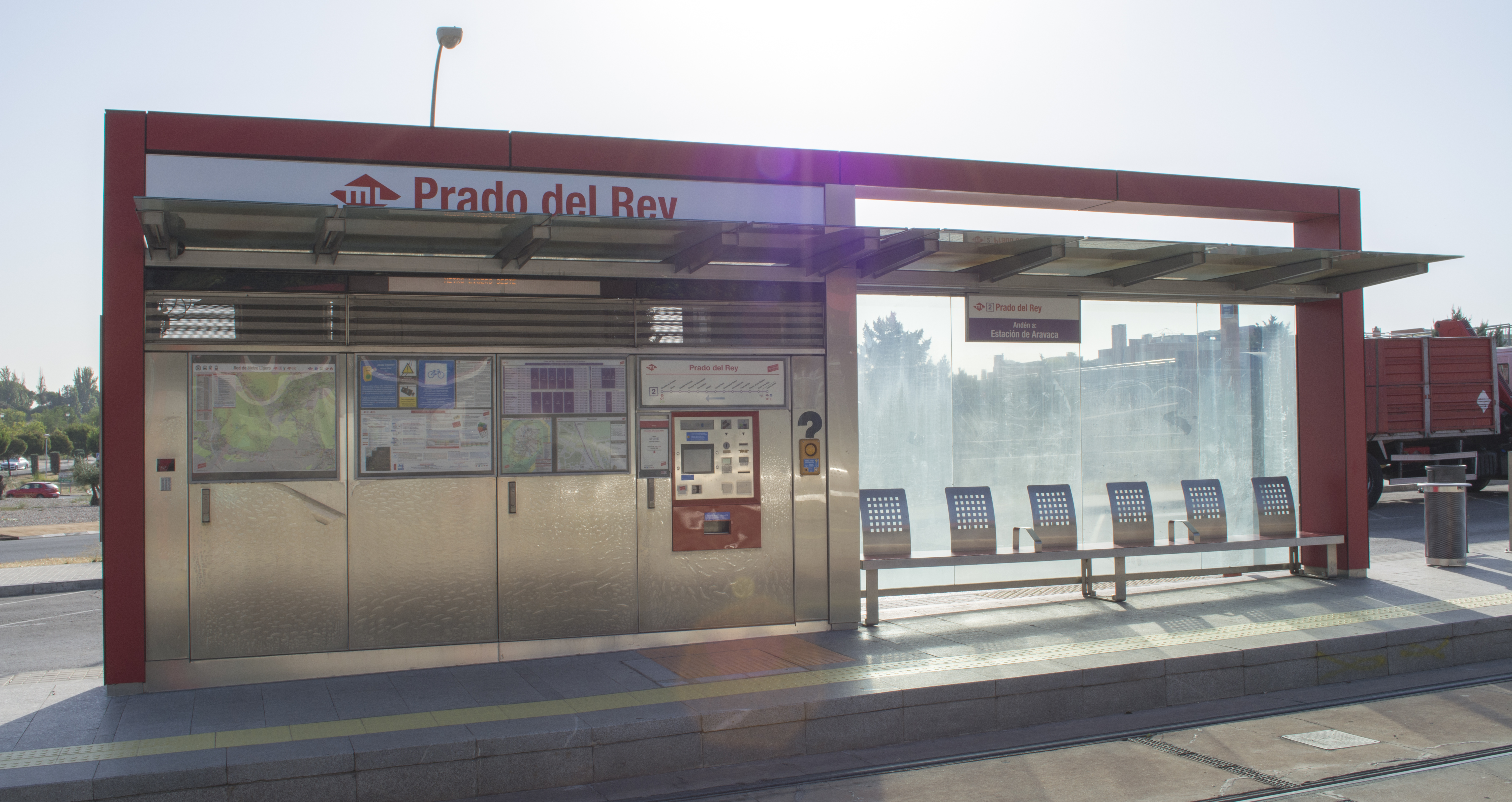 Andén de la estación Prado del Rey, de Metro Ligero Madrid, en dirección Estación de Aravaca.